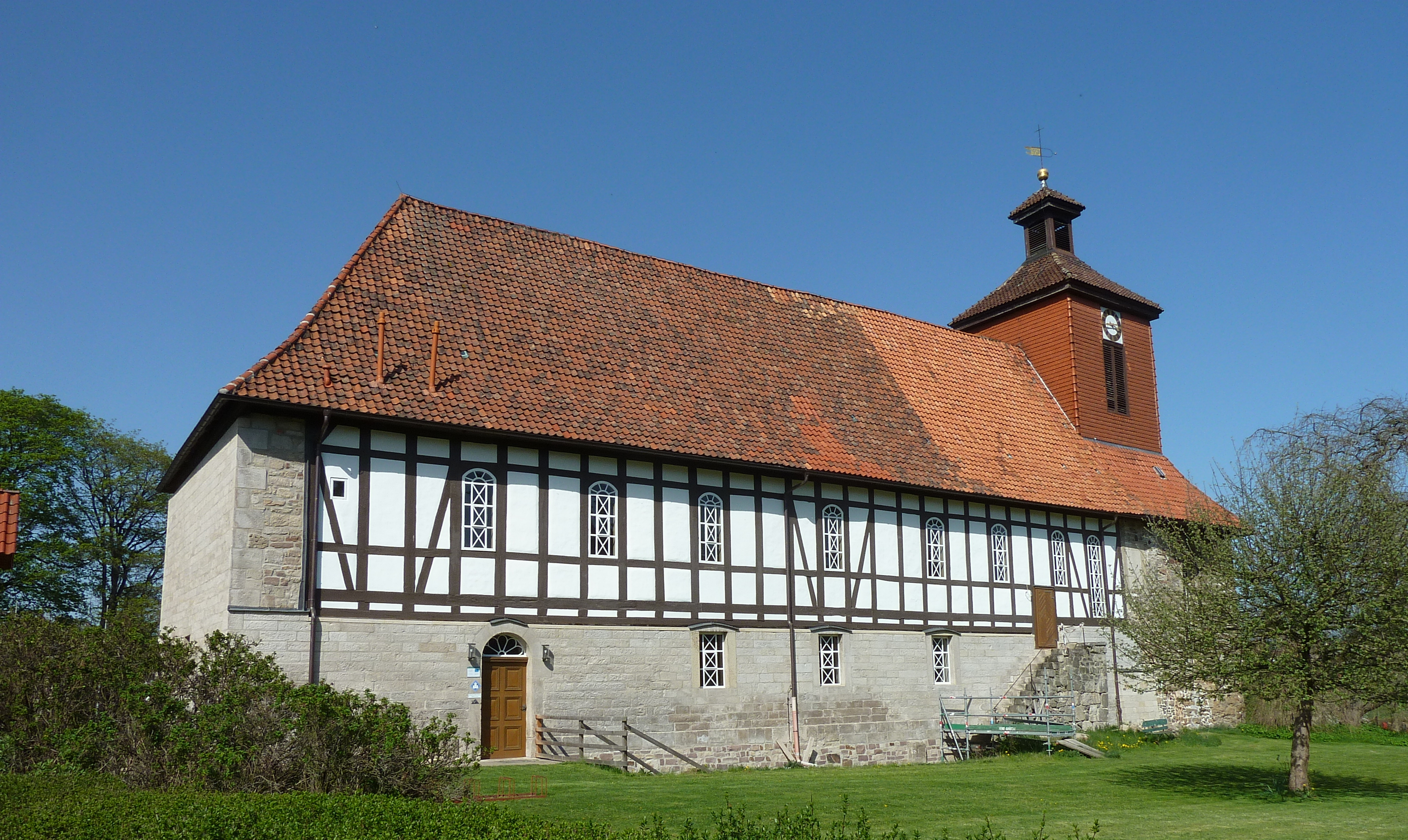 Südseite der ev.-luth. Kirche Johannes-Servatius in Pöhlde, Stadt Herzberg, Landkreis Osterode am Harz, Niedersachsen. Erbaut auf den Resten des Mittelschiffs der Benediktiner-Klosterkirche des Klosters Pöhlde. Fachwerkteil erbaut im 17. Jh. nach dem 30jährigen Krieg , Turm 1768